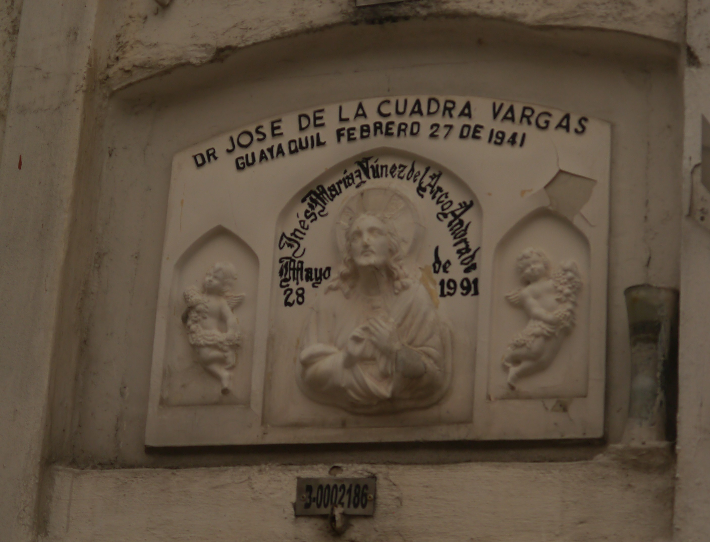 Bóveda de José de la Cuadra, escritor guayaquileño, en el Cementerio General de Guayaquil